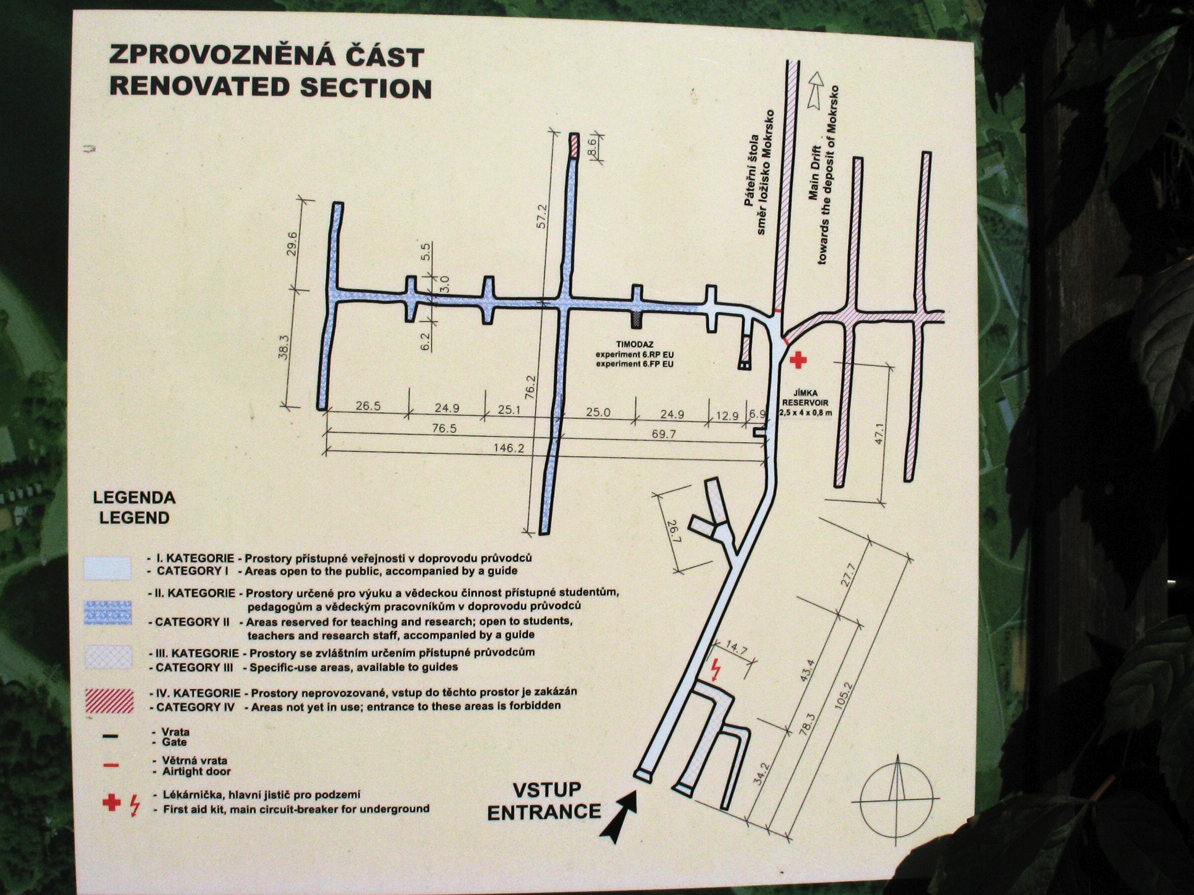 Plánek tras, zpřístupněných veřejnosti